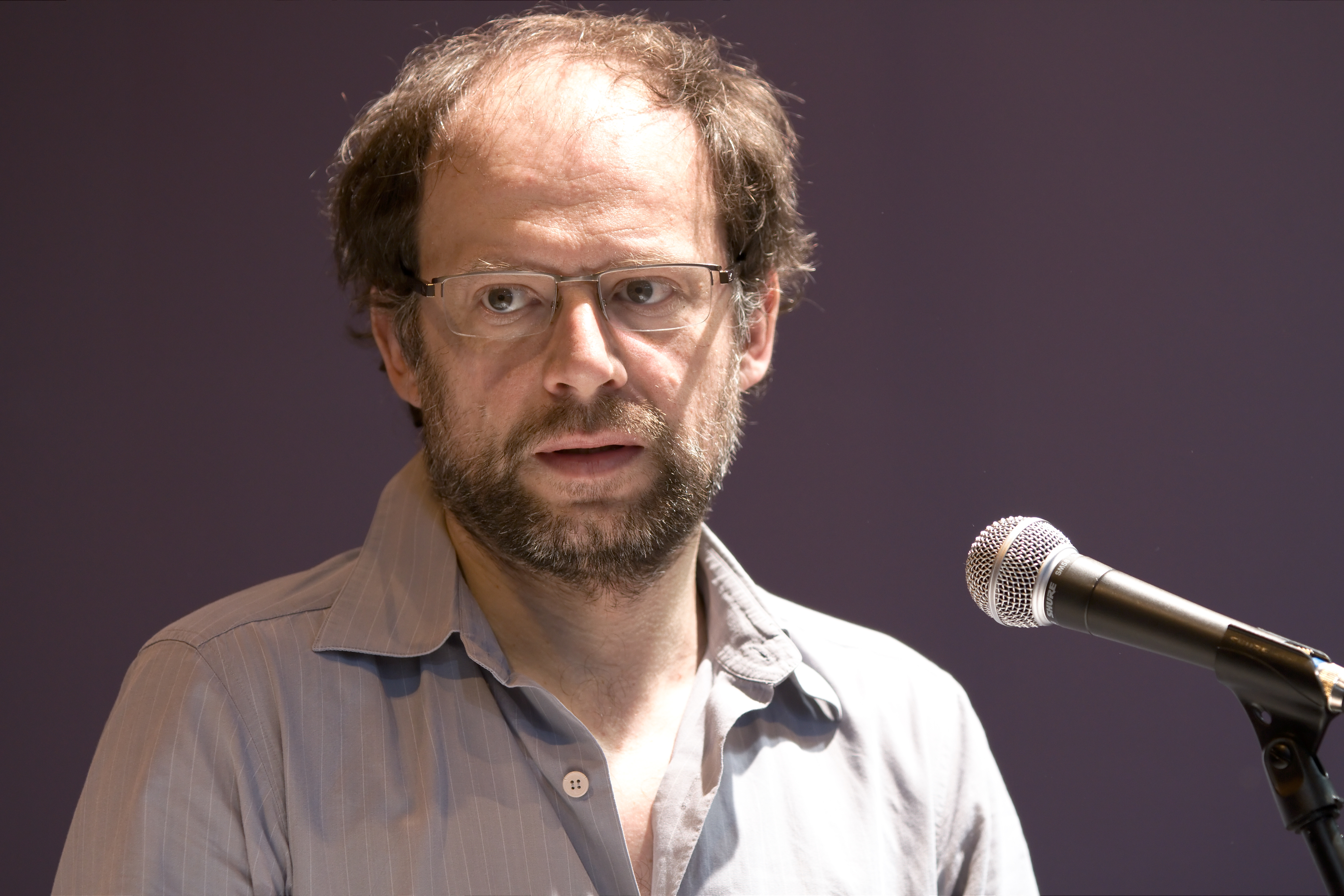 Lecture d'un roman de Dominique Fabre par l'acteur Denis Podalydès au Salon du livre de Paris.